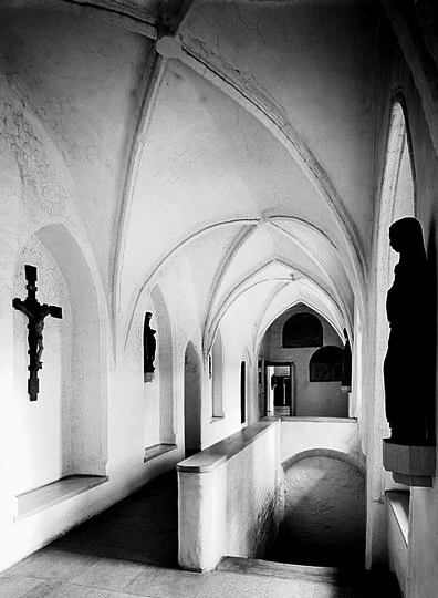 Firmarieflur des Schlosses